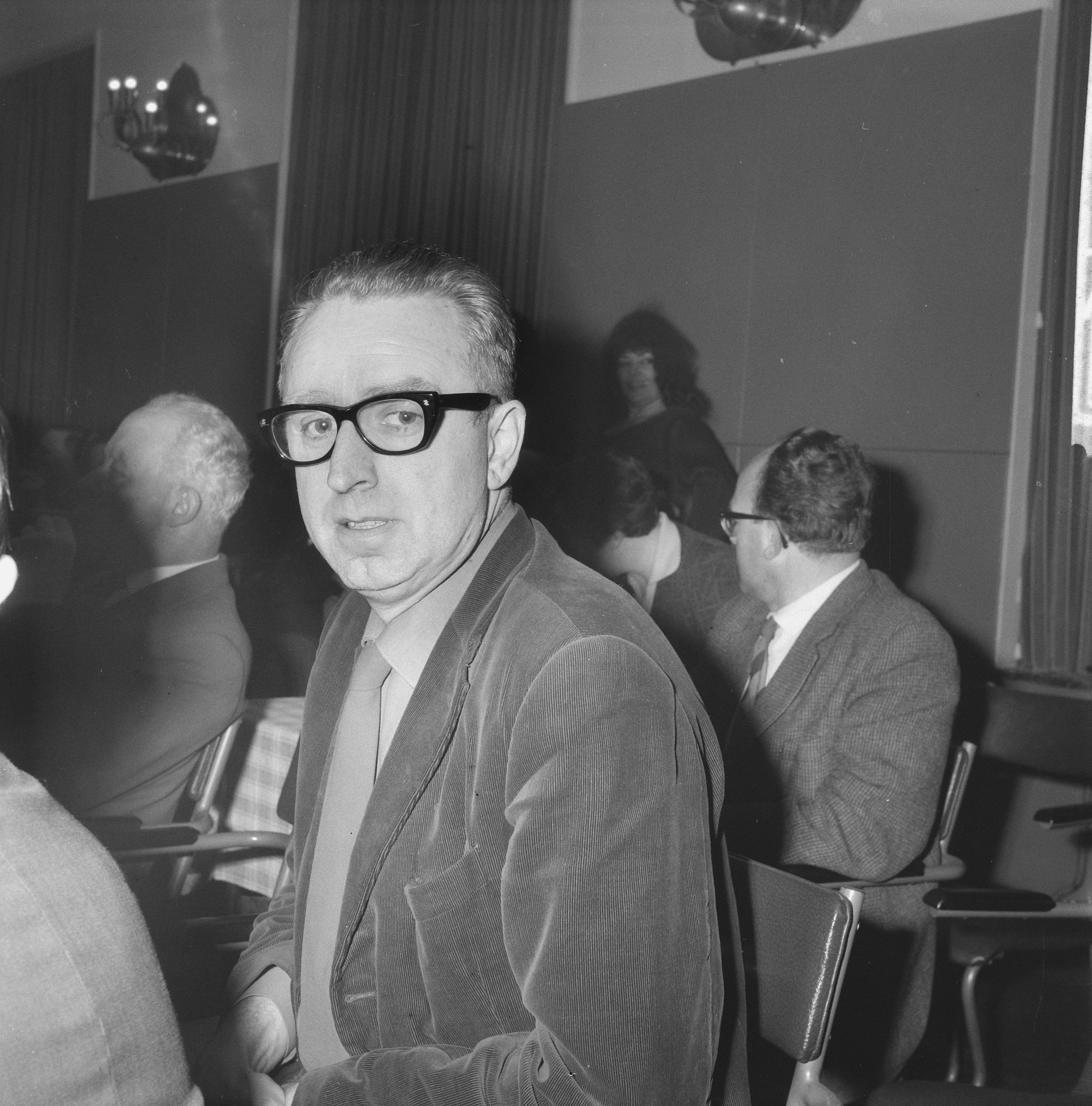 Collectie / Archief : Fotocollectie Anefo Reportage / Serie : [ onbekend ] Beschrijving : Vereniging van Letterkunde in Krasnapolsky over royement lid Marja (kop) Datum : 3 april 1962 Trefwoorden : LETTERKUNDE, leden, verenigingen Instellingsnaam : Krasnapolsky Fotograaf : Nijs, Jac. de / Anefo Auteursrechthebbende : Nationaal Archief Materiaalsoort : Negatief (zwart/wit) Nummer archiefinventaris : bekijk toegang 2.24.01.03 Bestanddeelnummer : 913-7207